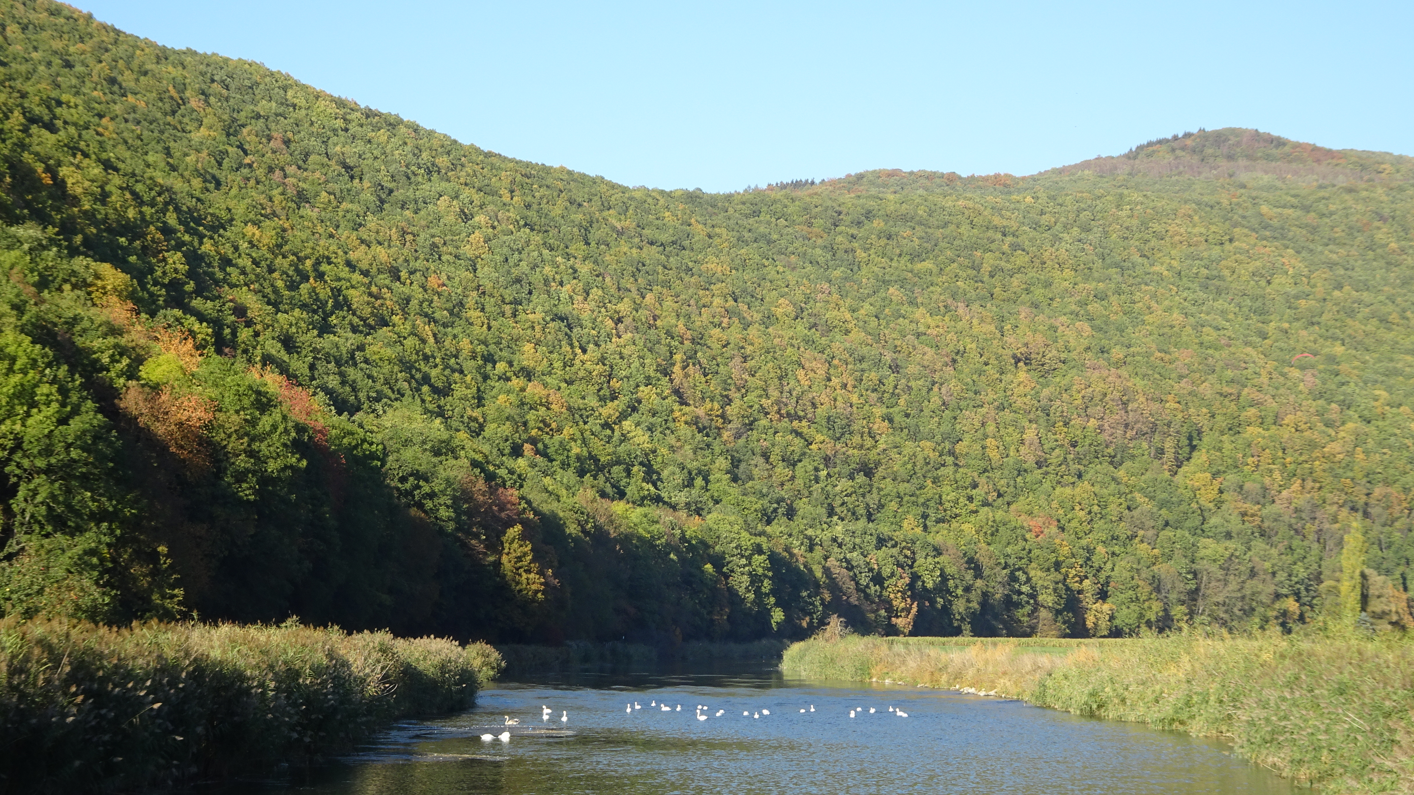 Der Harthberg ist eine 317,6 m hohe Erhebung rechts der Werra im nordhessischen Werra-Meißner-Kreis. Auf dem steilen, trockenen und wärmebegünstigten Prallhang der Werra-Mäanderschleife haben sich durch die historische Bewirtschaftung als Niederwald Traubeneichenmischwälder ausgebildet. Um diesen seltenen Waldtyp mit dem angrenzenden staudenreichen Werraufer zu erhalten und zu schützen wurde der Bereich im Dezember 1993 zum Naturschutzgebiet erklärt und später als Teil des Flora-Fauna-Habitat-Gebiets „Werra- und Wehretal“ in dem europaweiten Netz von Schutzgebieten „Natura 2000“ verankert. Der Harthberg liegt in der Gemarkung von Werleshausen, einem Ortsteil der Stadt Witzenhausen. Er bildet das westliche Ende des Höhebergs, eines Höhenzugs des Unteren Werraberglandes im Grenzbereich von Hessen und Thüringen. Sein Südhang reicht bis an die hufeisenförmige Werraschleife bei Oberrieden und dem thüringischen Lindewerra im Landkreis Eichsfeld.